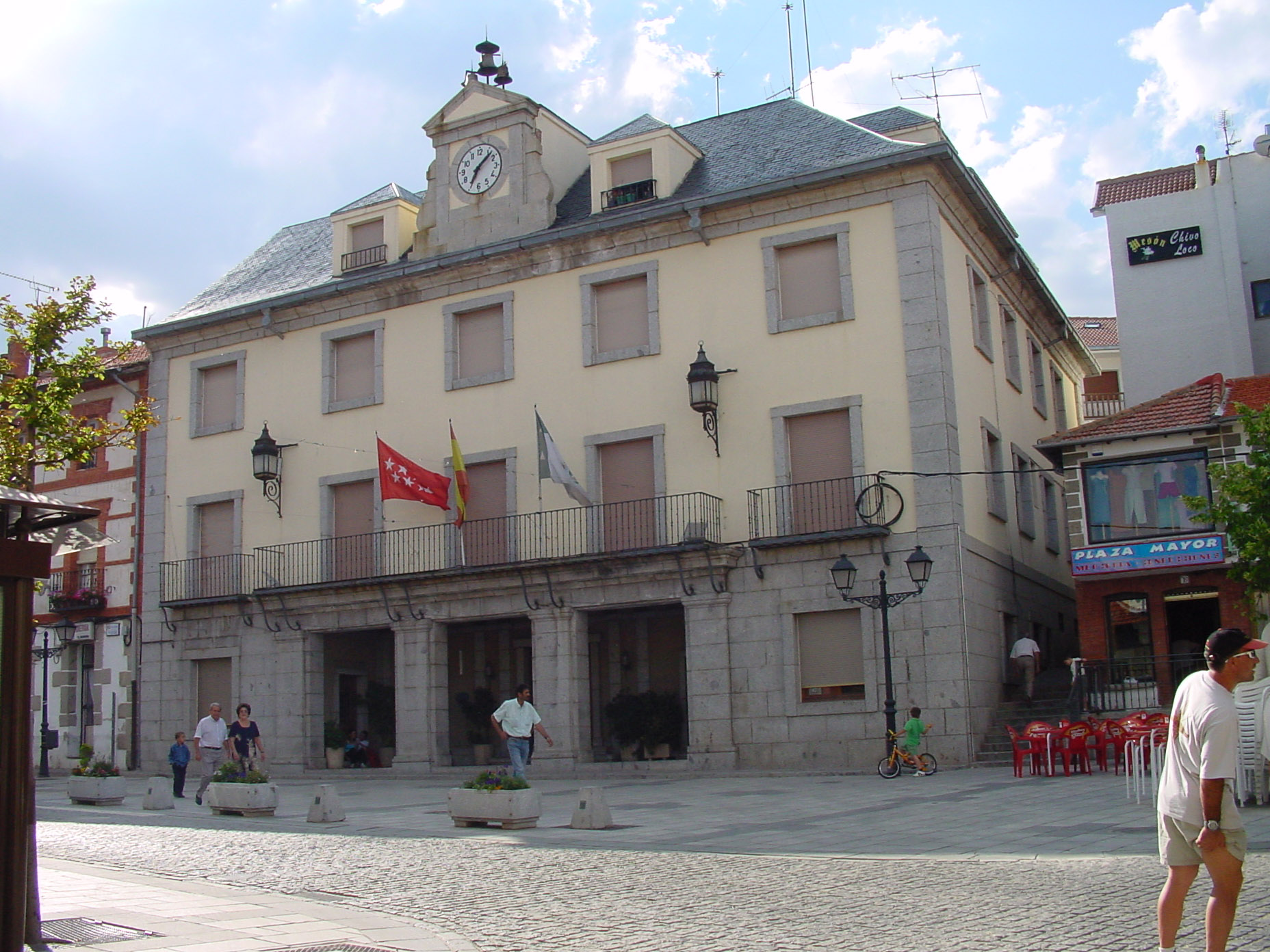 Ayuntamiento de Cercedilla.